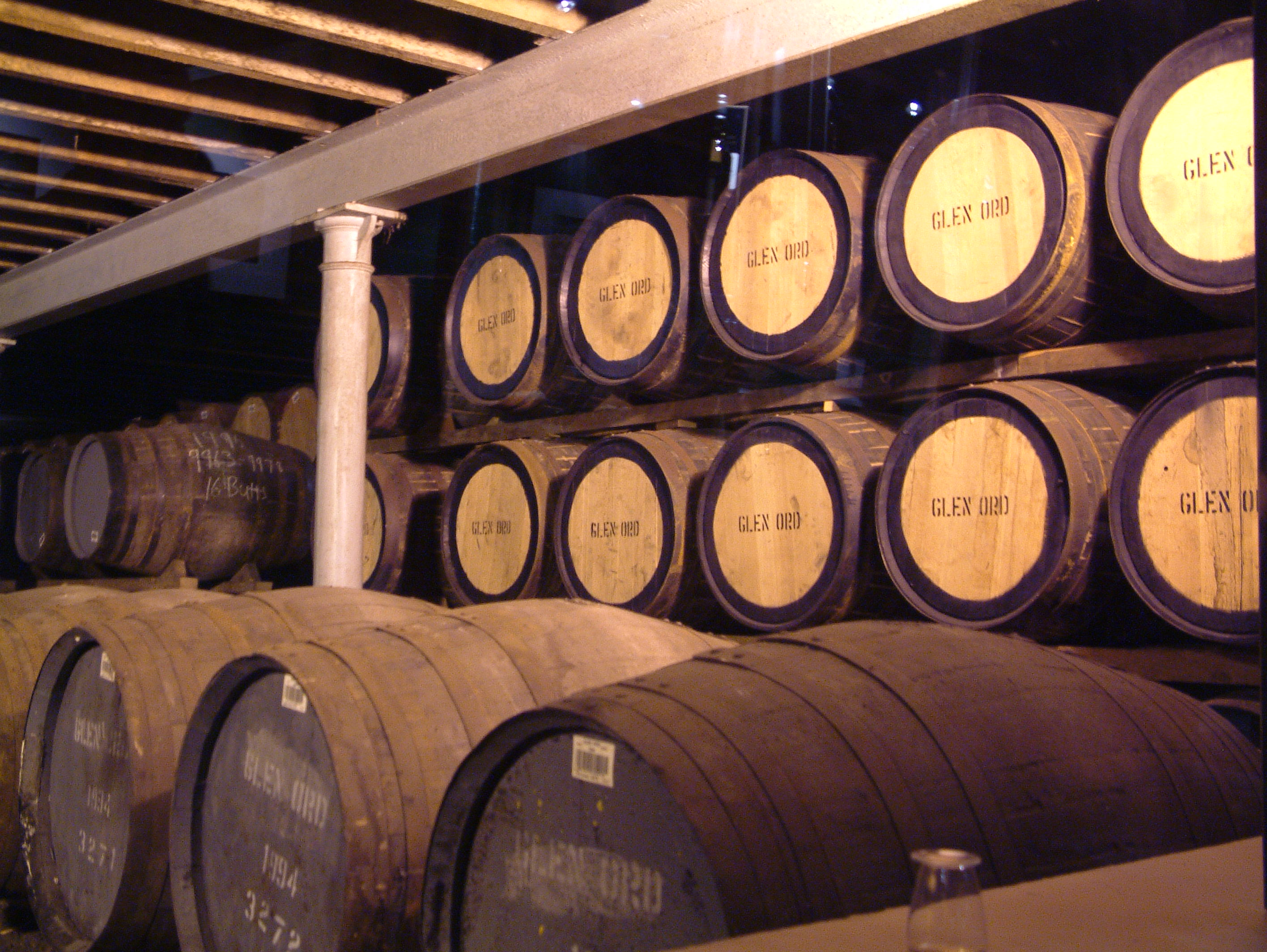 foto StaraBlazkova 2006